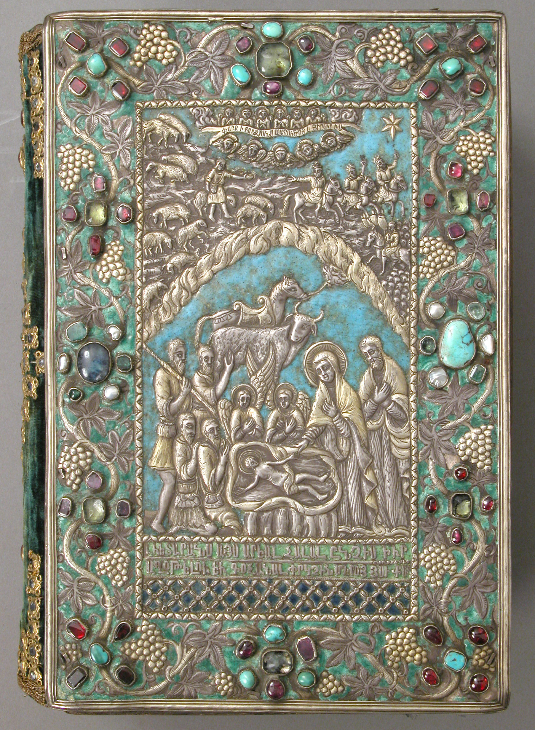 Illustrated manuscript; Codices